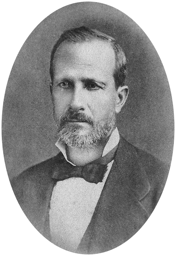 Belmino da Silveira Lins, Barão de Escada.